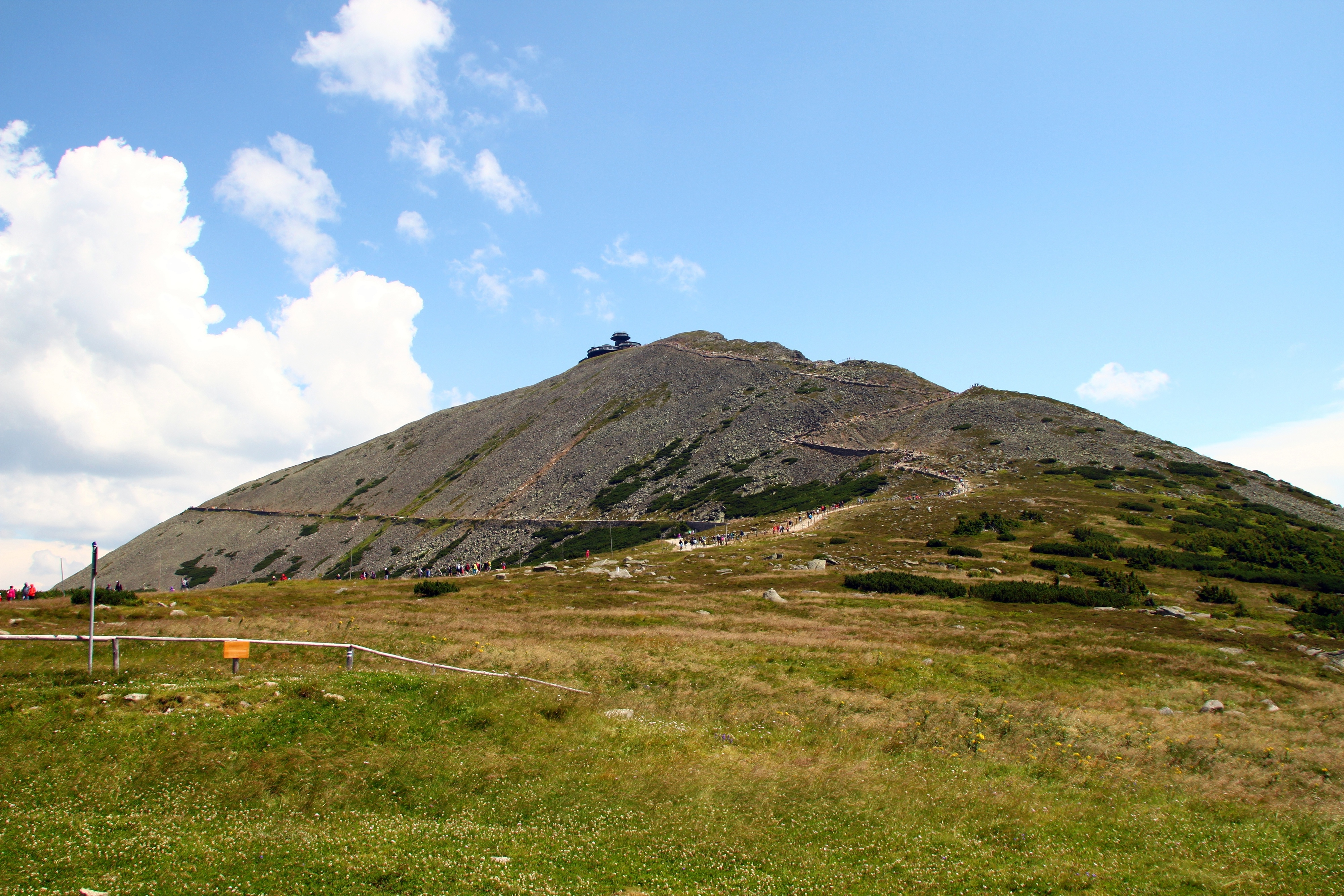 Obszar specjalnej ochrony ptaków Karkonosze. This is a photography of Natura 2000 protected area with ID PLB020007